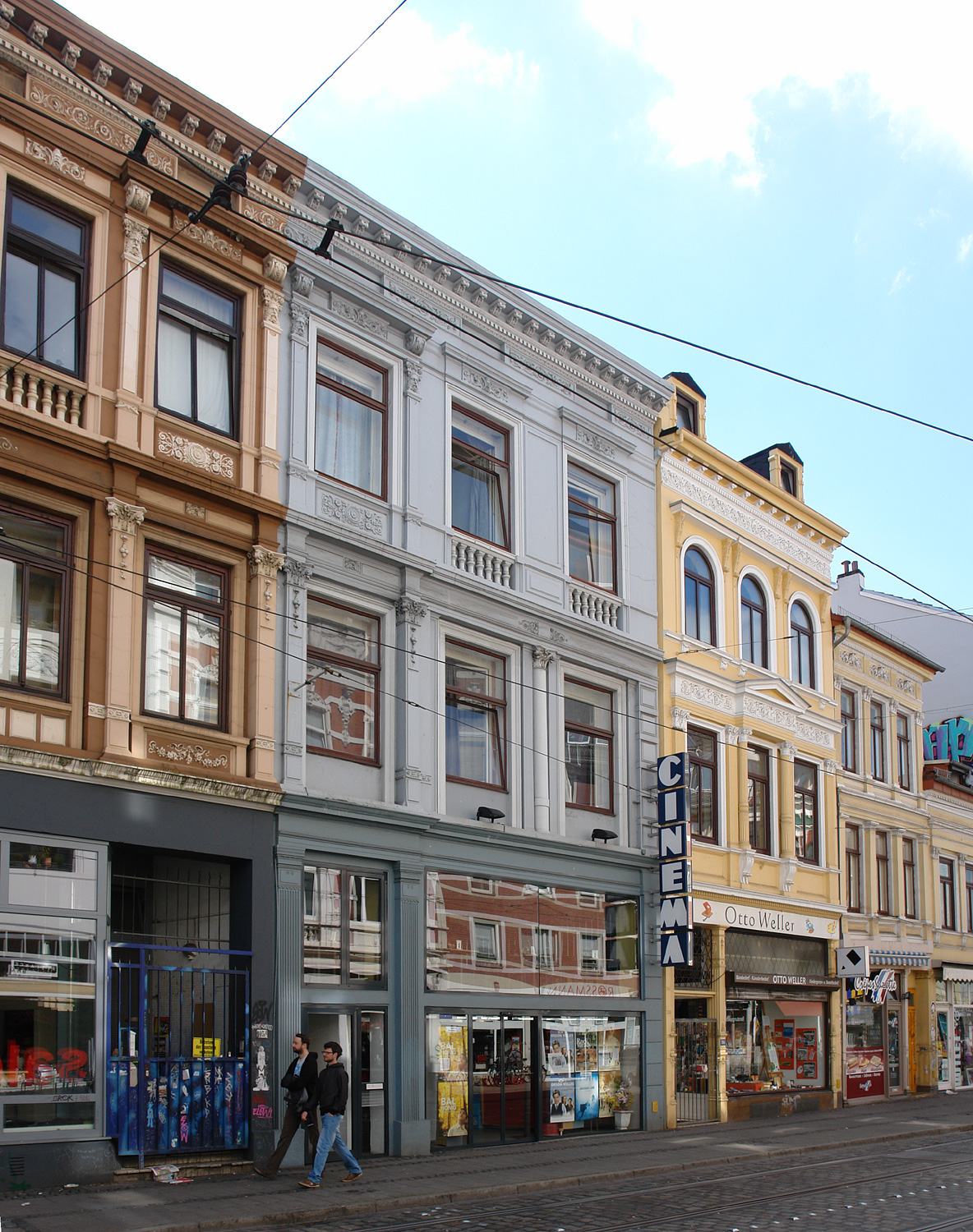 Bremer Haus am Ostertorsteinweg (Cinema im Ostertor) Die Denkmalgruppe Ostertorsteinweg 100—107 ist ein geschütztes Kulturdenkmal in der Freien Hansestadt Bremen, mit der Nr. 0965 beim Landesamt für Denkmalpflege registriert.